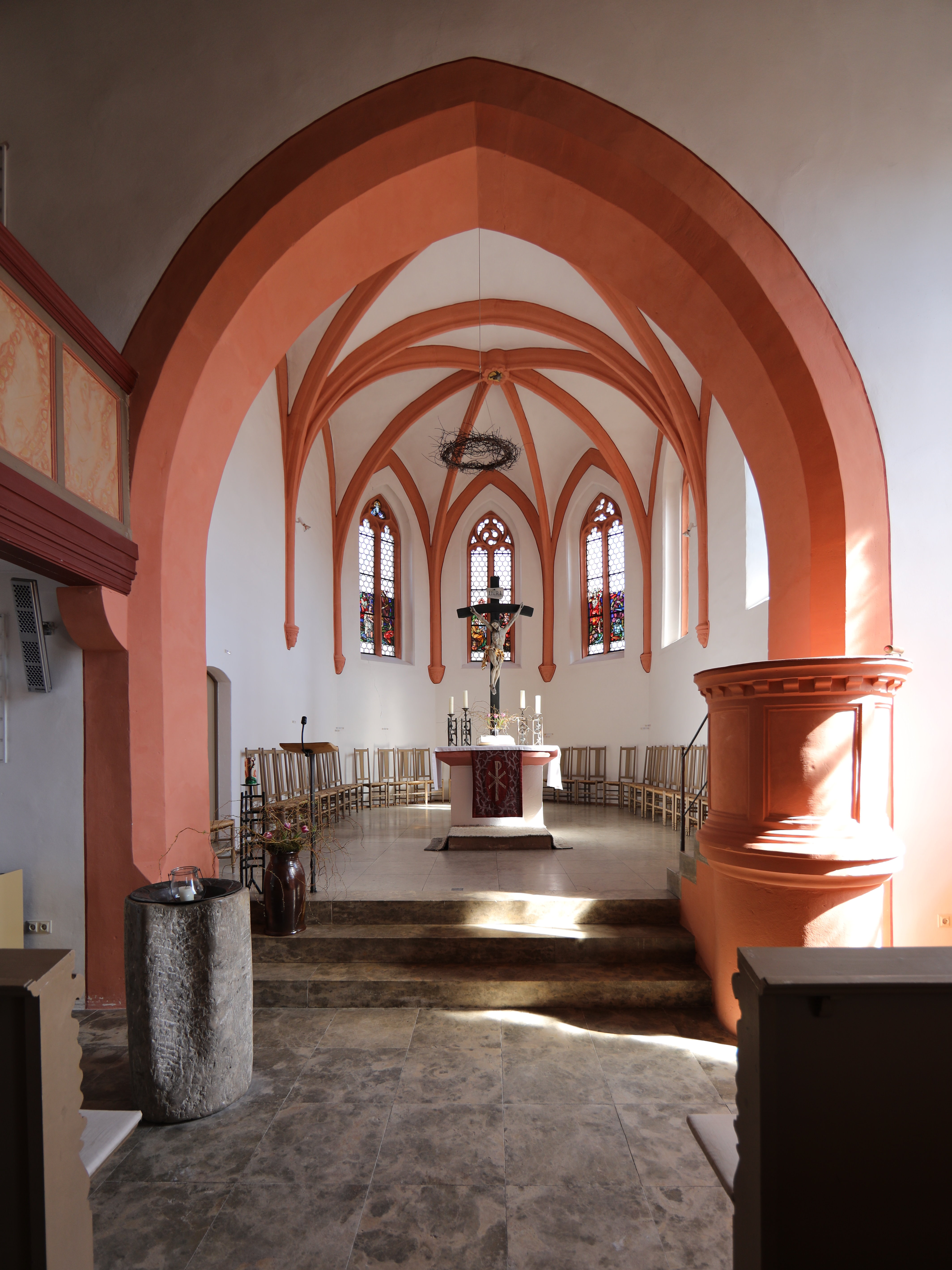 Evangelische Pfarrkirche Unserer Lieben Frau in Seidmannsdorf